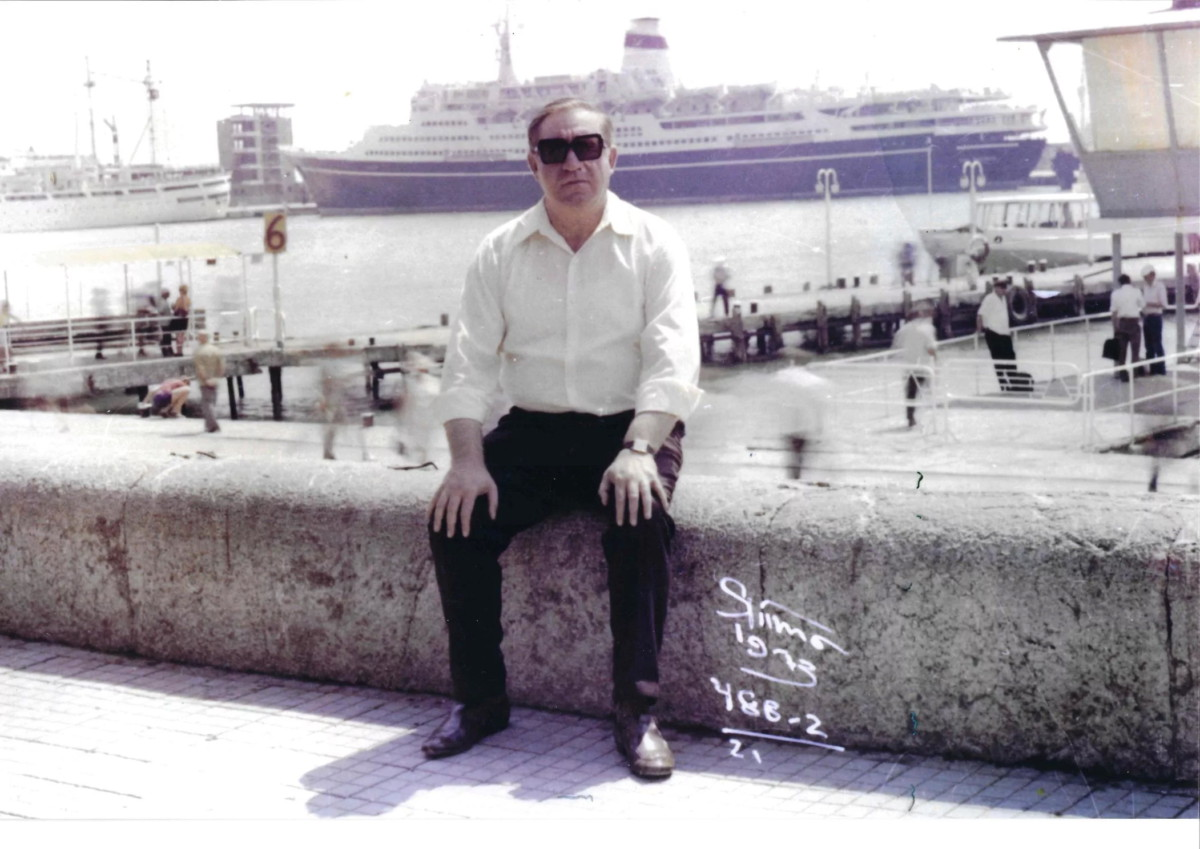 Сафарбек Саадович Гуцериев (1920-1978), на набережной г. Ялта.